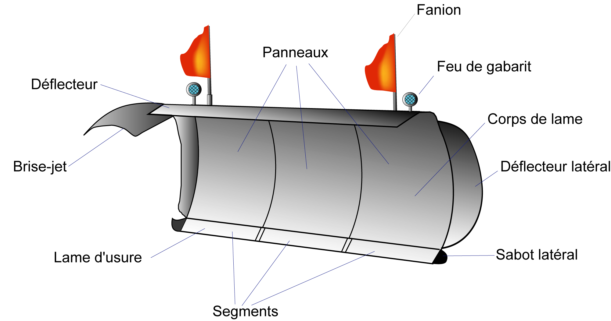 Lame biaise - Outil utilisé en déneigement